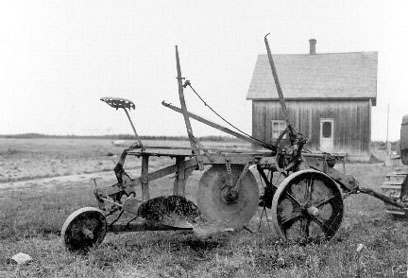 Rochebaucourt. Charrue Brushbraker